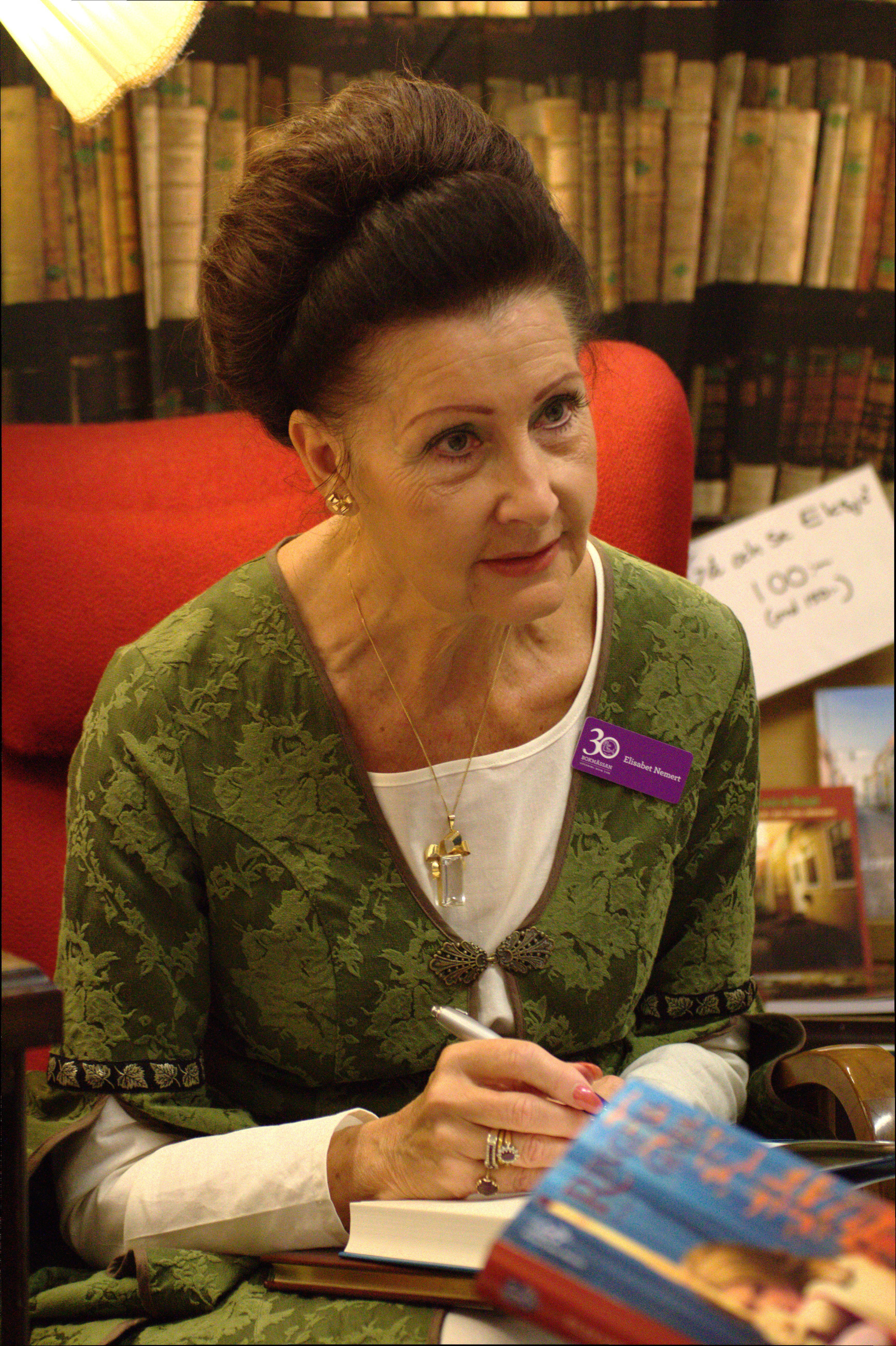 Elisabet Nemert på Bok- och biblioteksmässan i Göteborg 2014